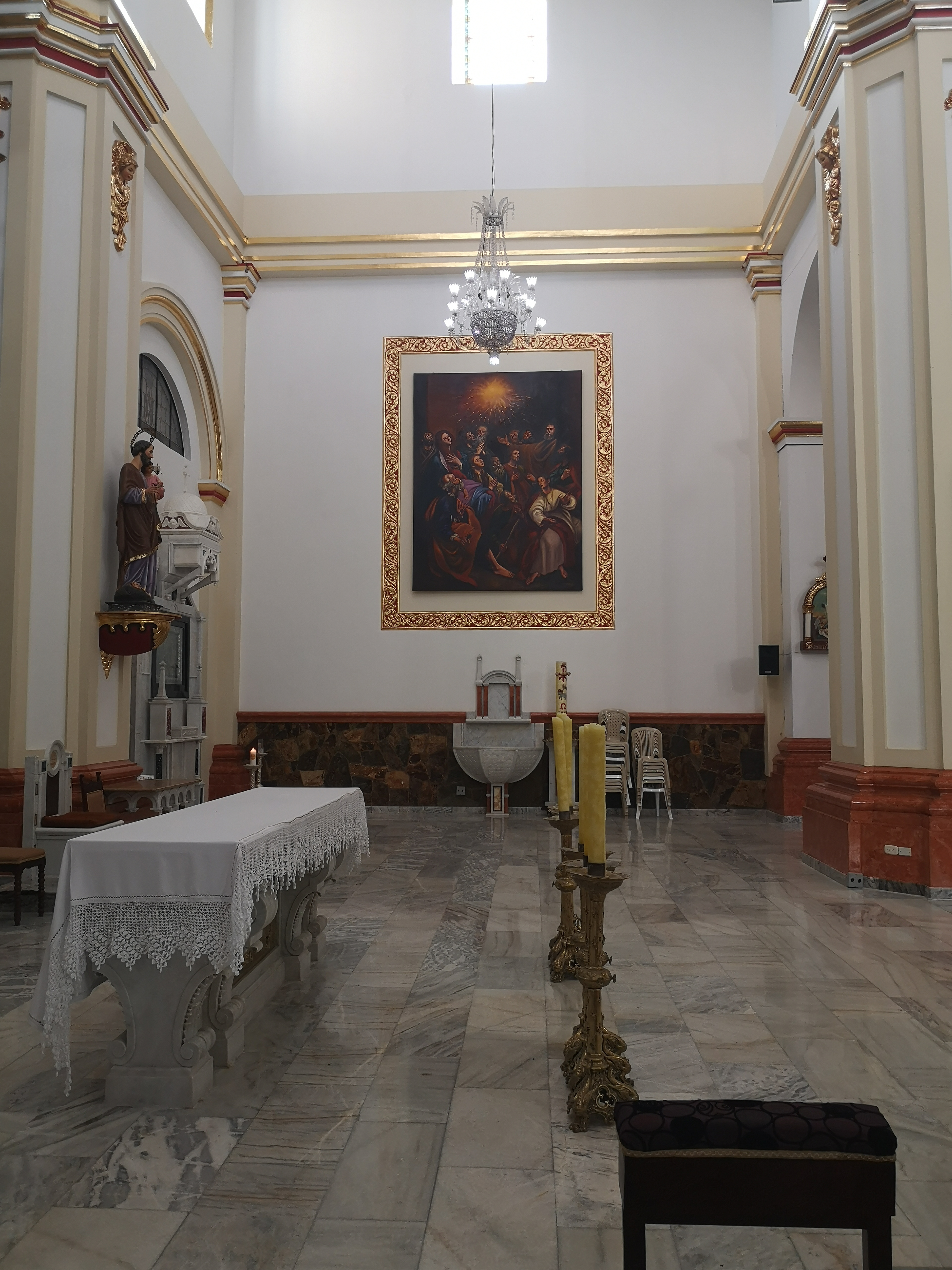 Catedral de Santa Rosa de Osos